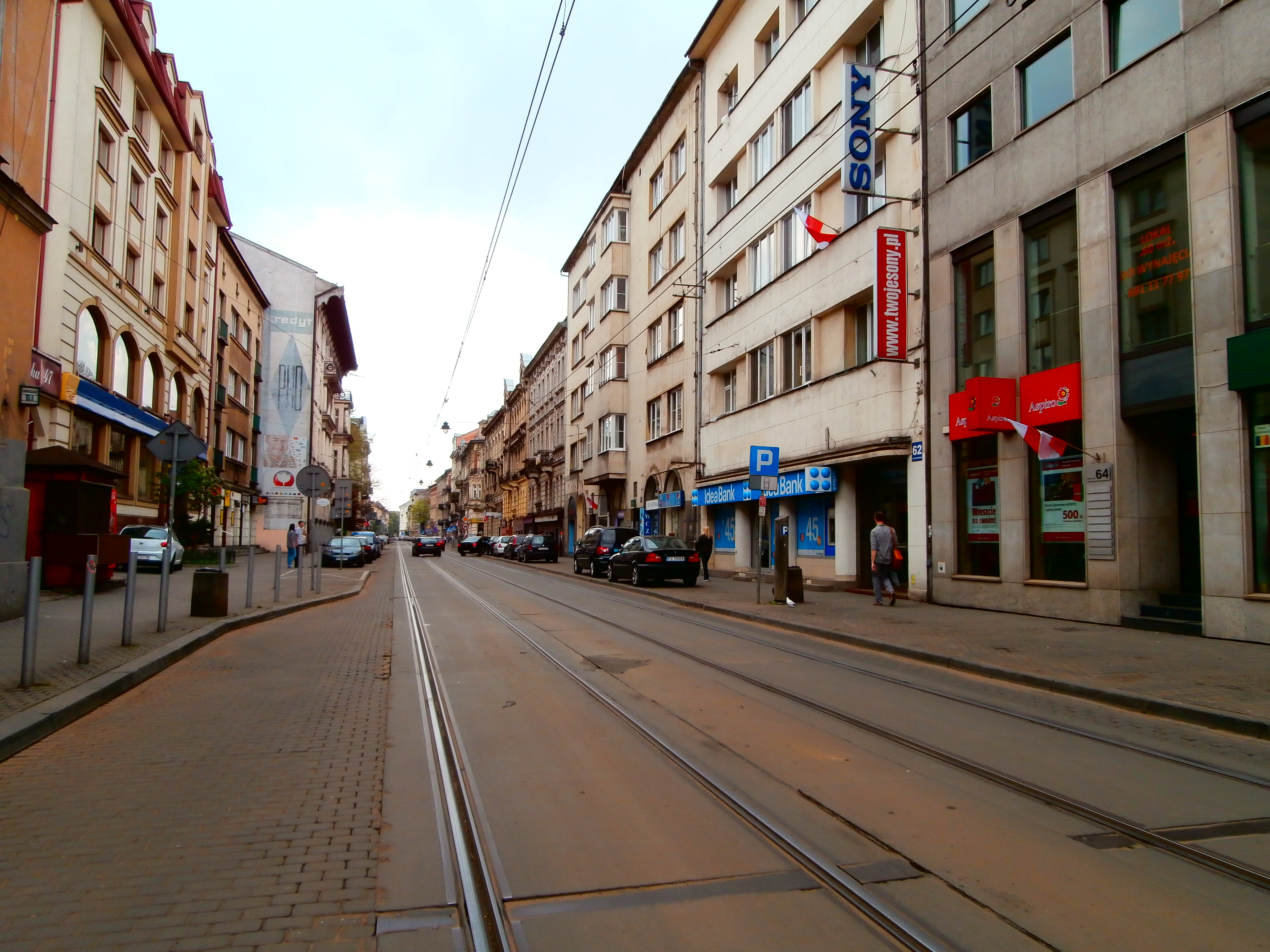 Ulica Karmelicka w Krakowie, widok na południe, w stronę Plant.